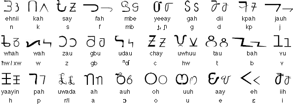 Les 30 caractères de l'alphabet bassa